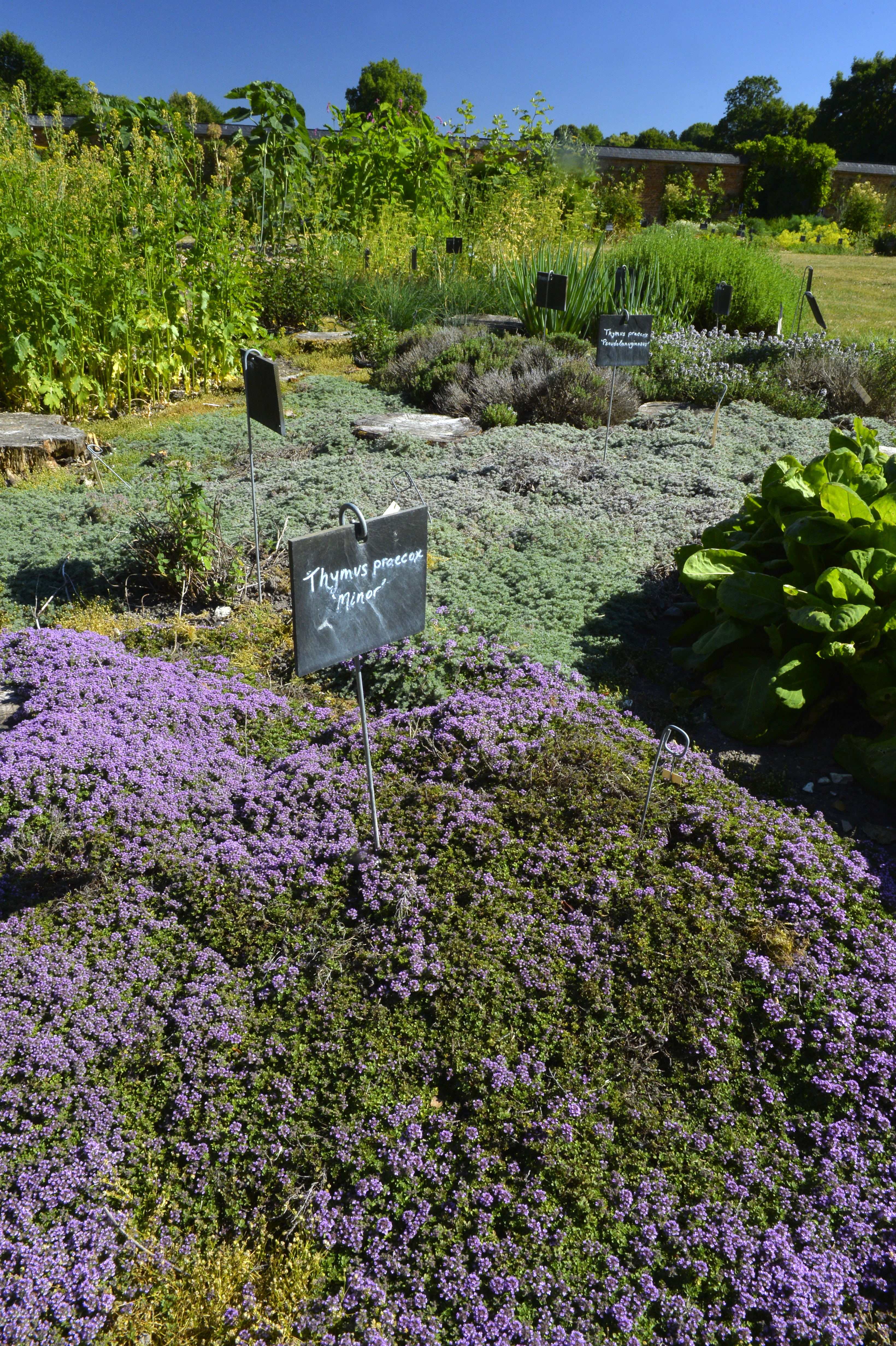 Un jardin secret en pleine renaissance